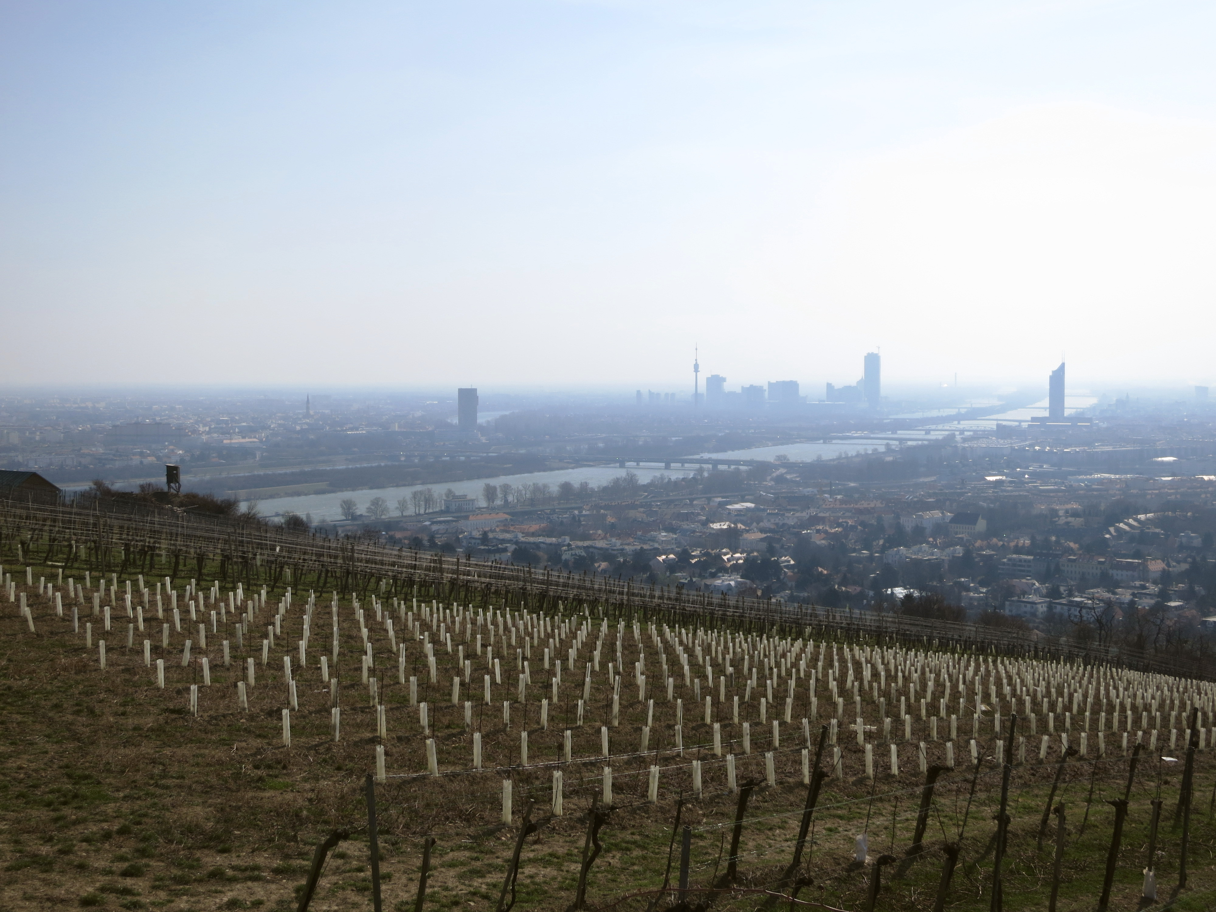 Blick vom Nussberg auf Wien und die Donau; rechts der Bildmitte der Donauturm